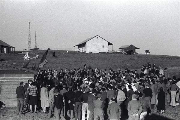 גליל ים - חגיגת יום העליה